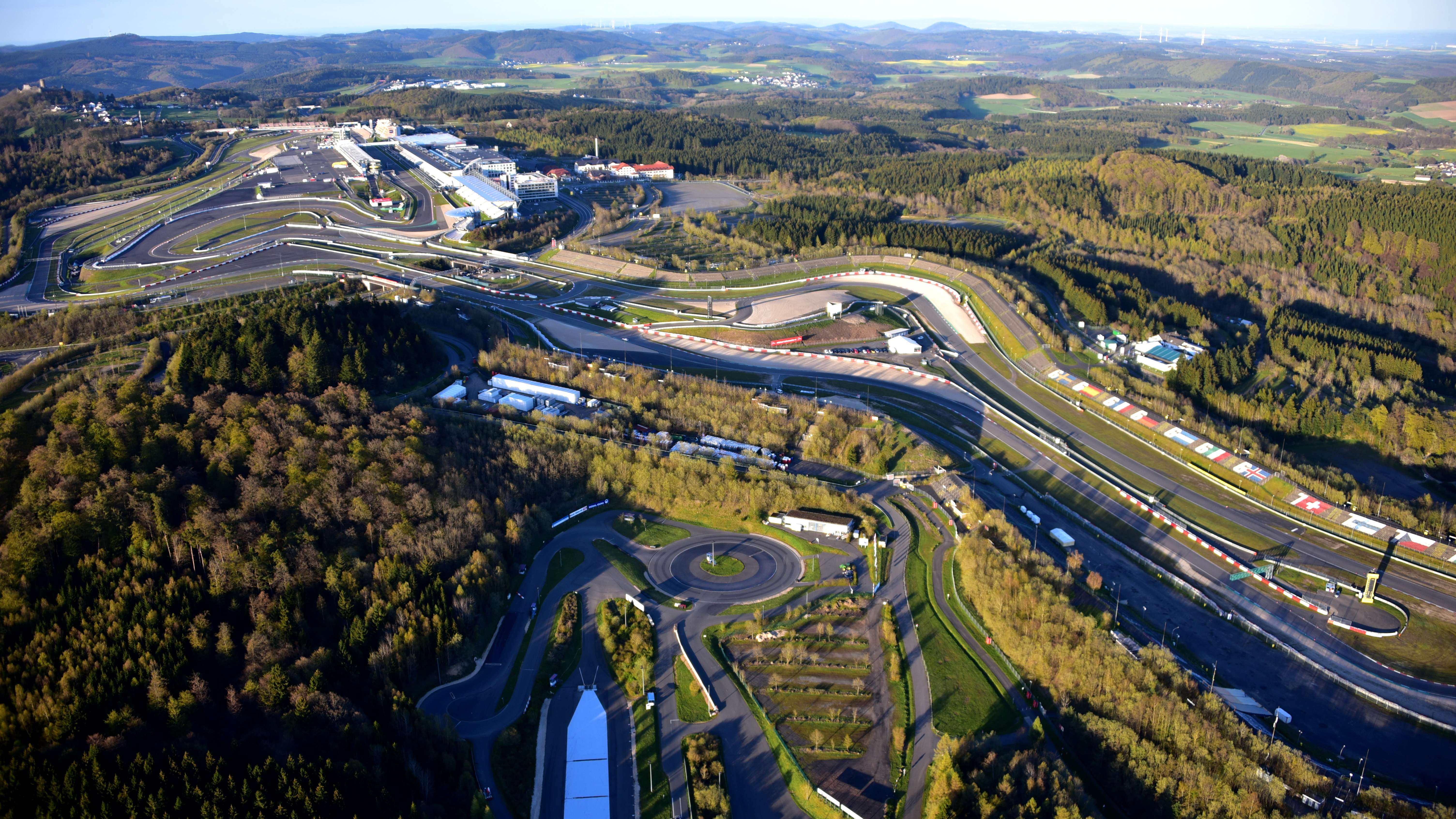 Nürburgring, Luftaufnahme (2016)